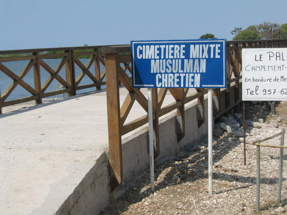 Cimetière chrétien et musulman à Fadiouth (Sénégal)